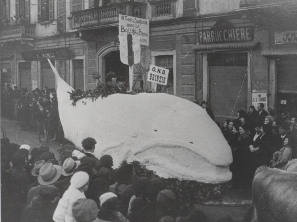 Carro di carnevale raffigurante una balena in gesso, presentato dall'OND Brinzio alla sfilata carnevalesca di Varese nel 1935, ove vinse il primo premio.